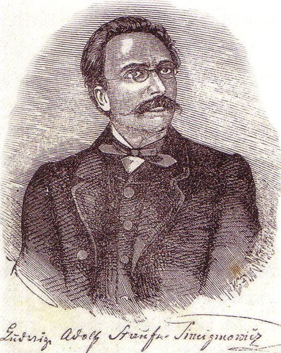 Lithographie von Ludwig Adolf Staufe-Simiginowicz (1832-1897)